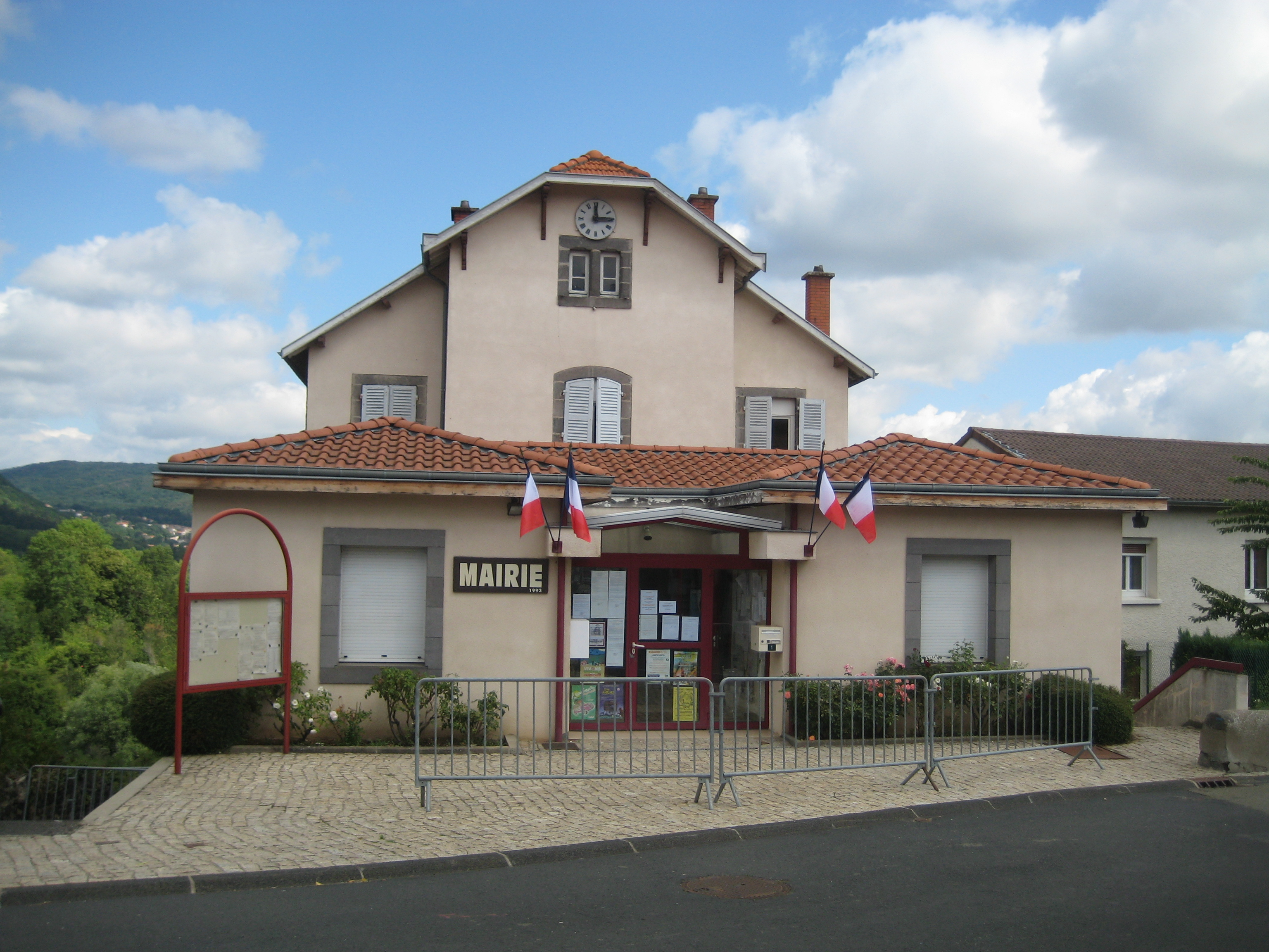 Mairie de Malauzat